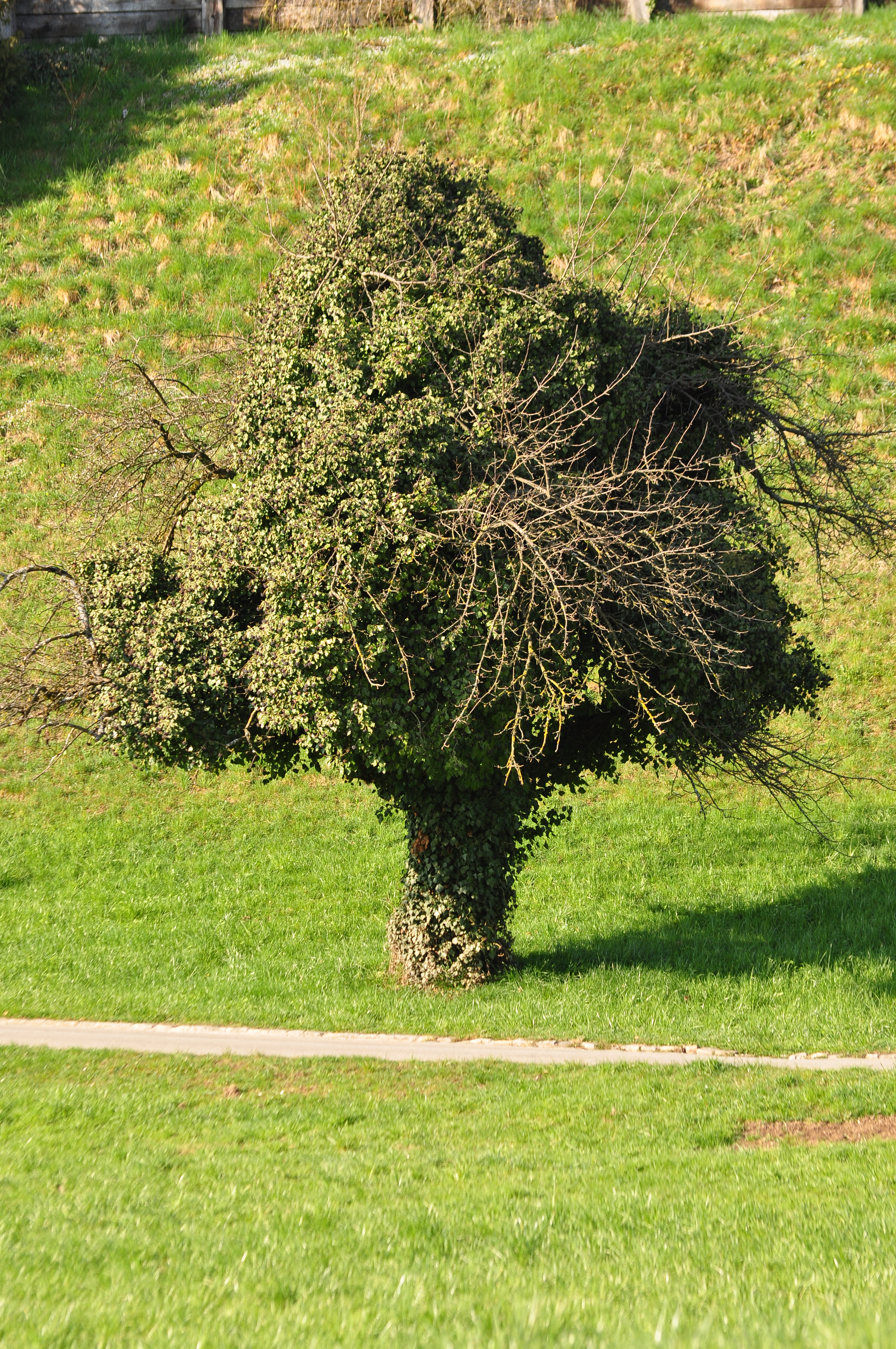 Schwenkel in Kempraten-Lenggis (Switzerland)